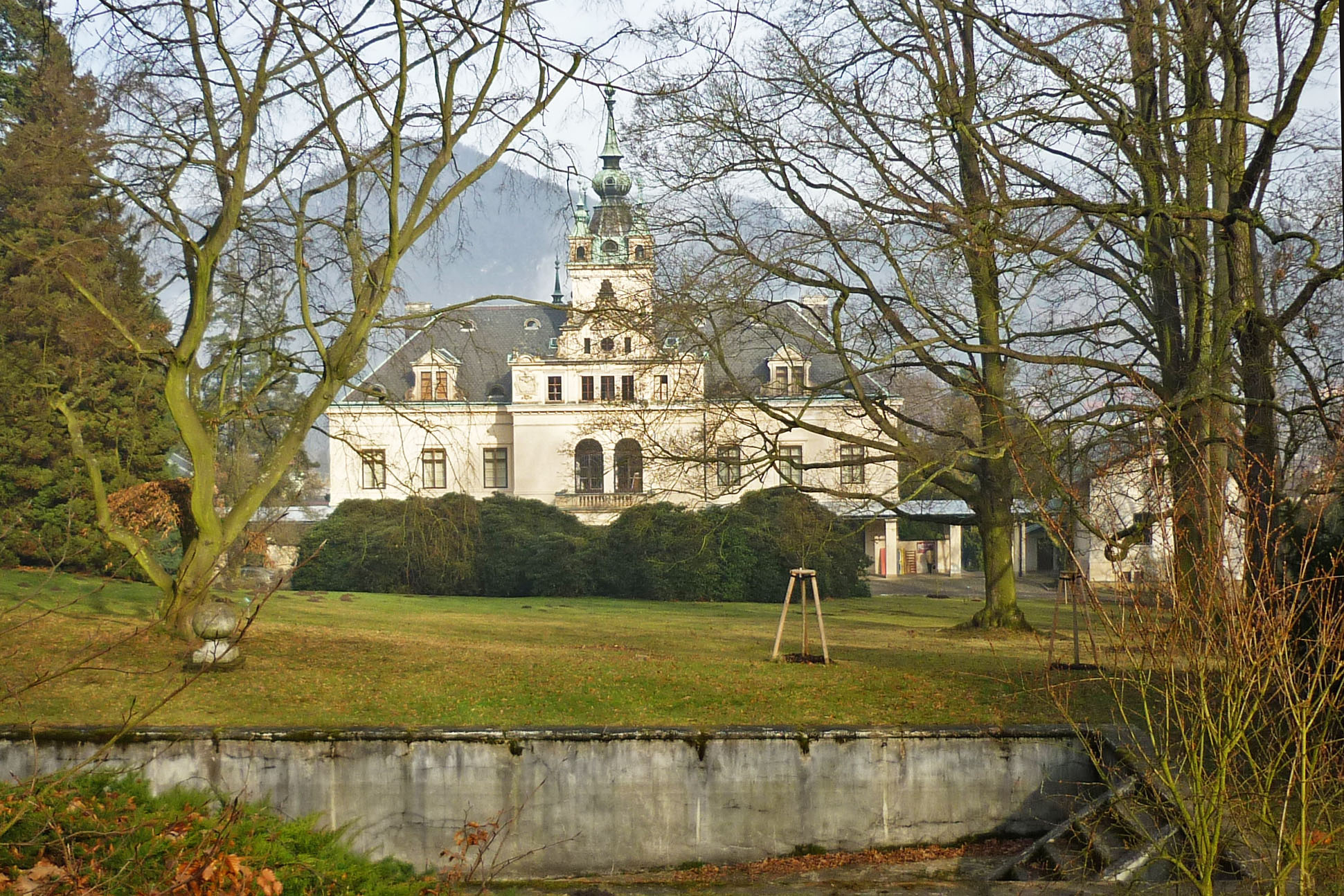 Schloss in Großpriesen, Gartenseite